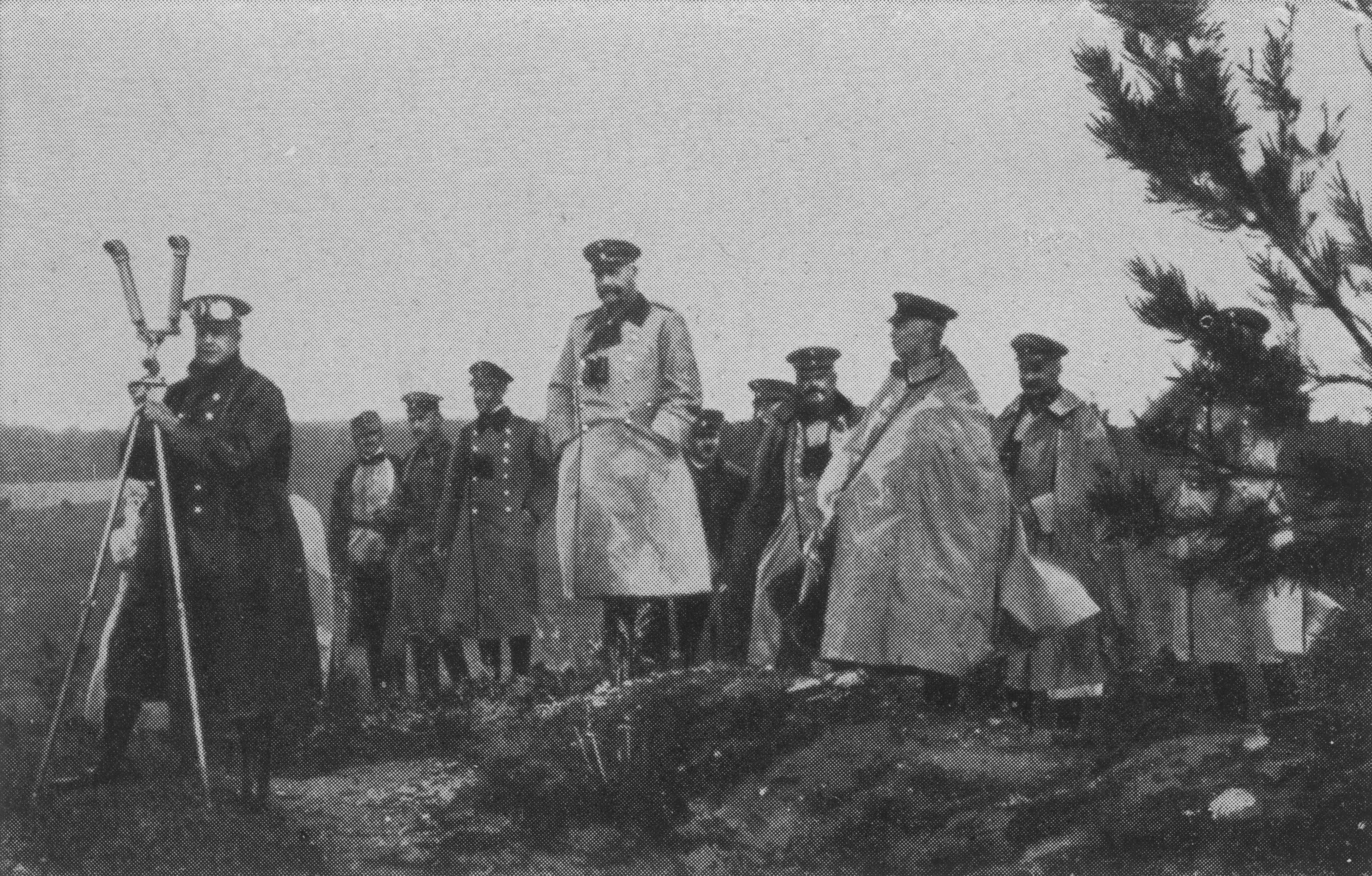 Der Stab der 8.Armee, keine weiteren Angaben, Sep. 1914 Schlacht bei den Masurischen Seen vermutlich